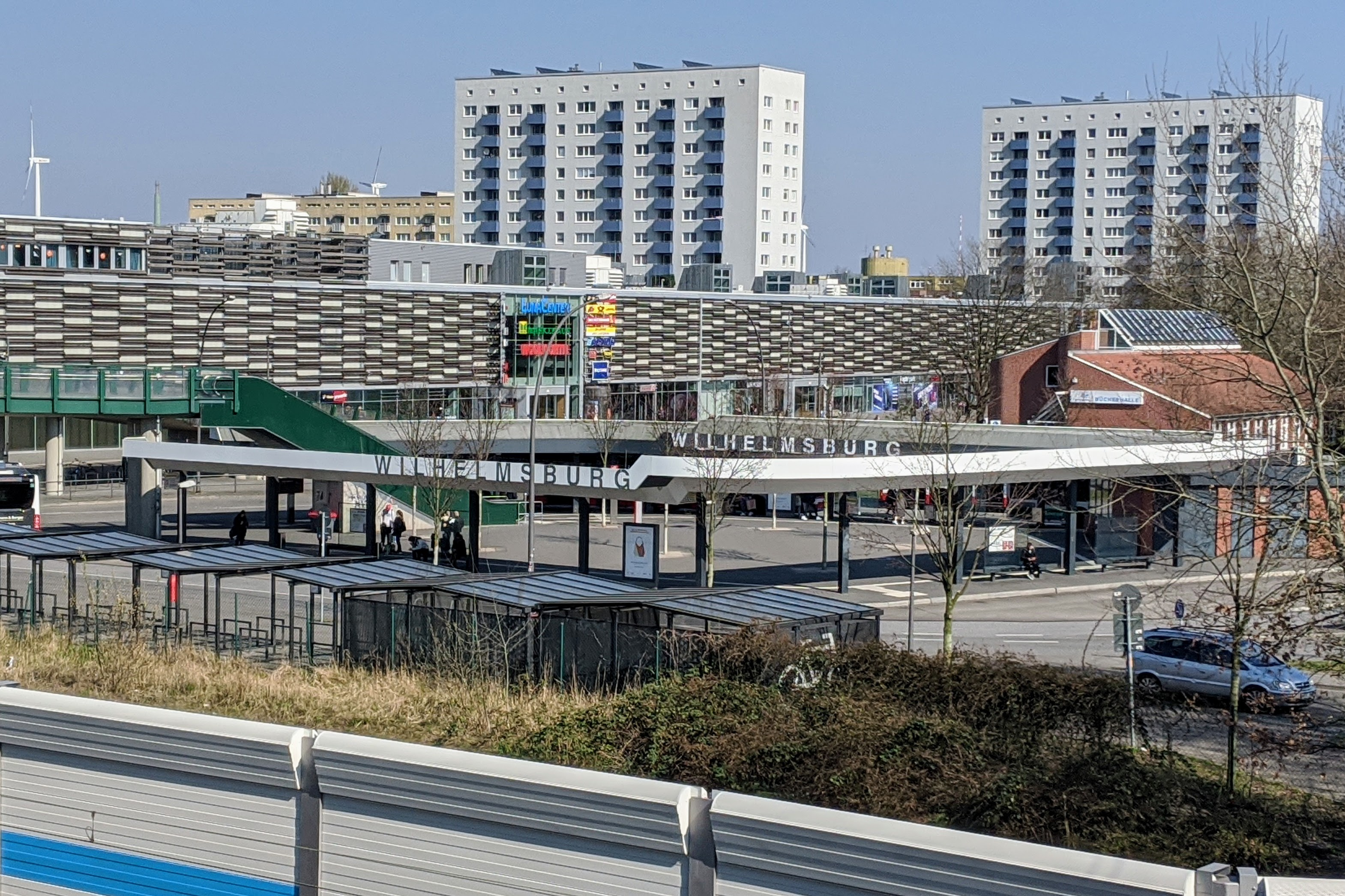 Hamburg-Wilhelmsburg, Busbahnhof